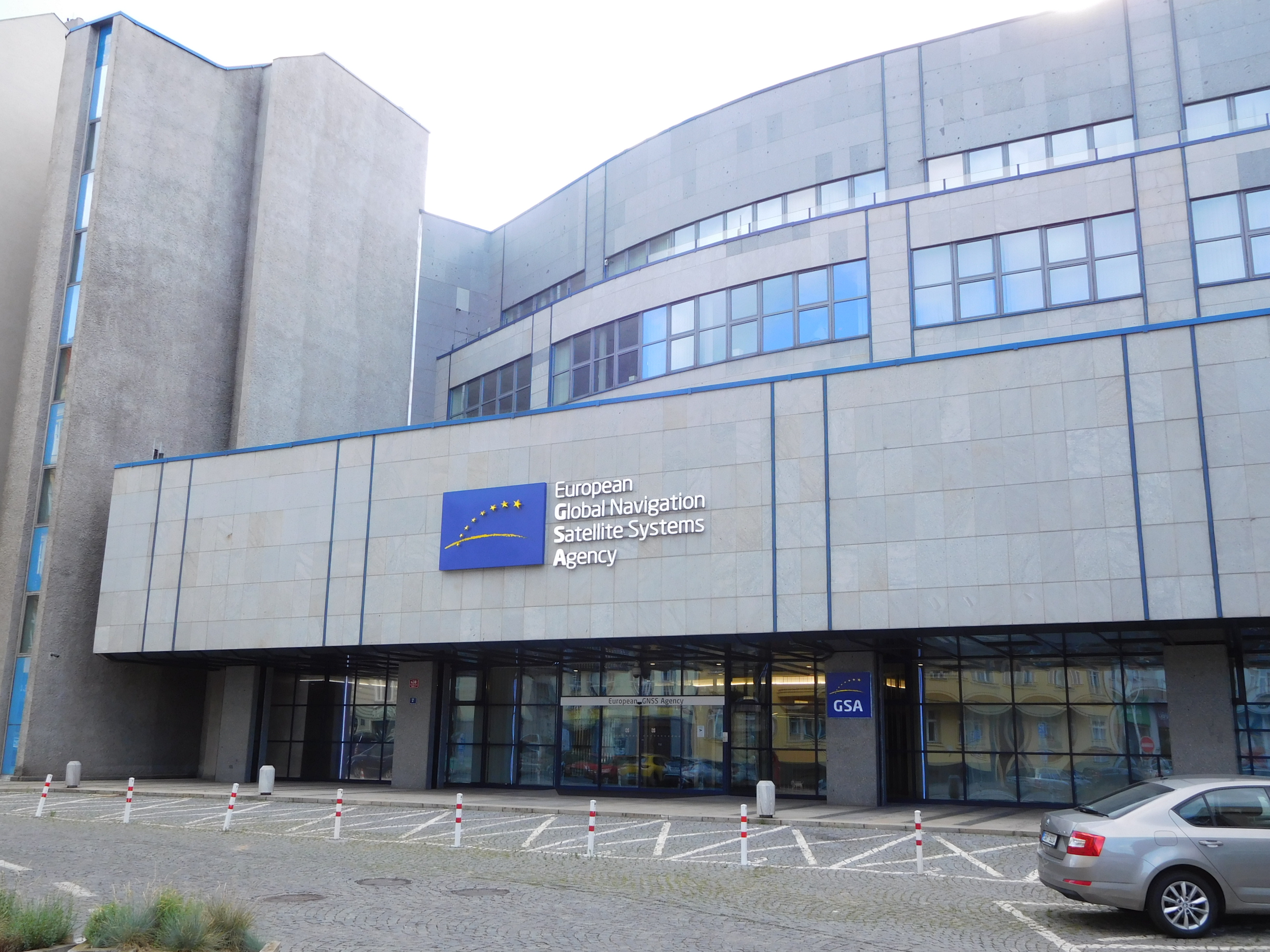 Praha - Holešovice, - sídlo GSA, pohled z Janovského/Na ovčinách